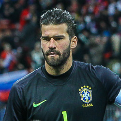 Россия проиграла Бразилии со счетом 0:3